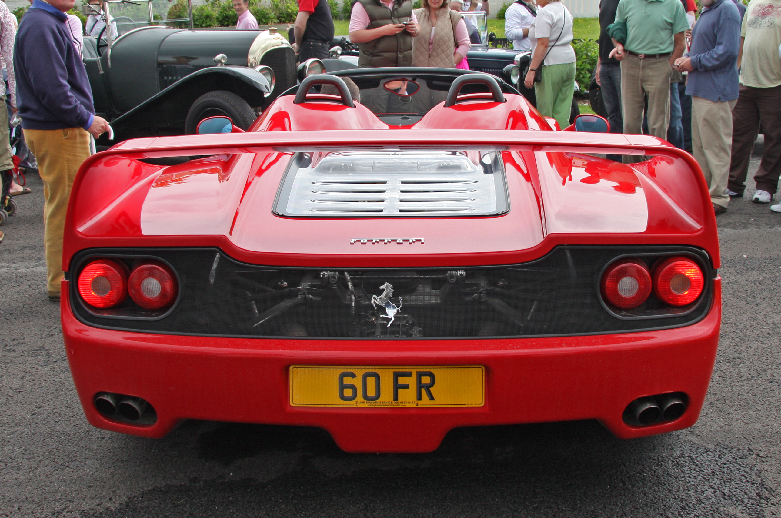 Ferrari F50